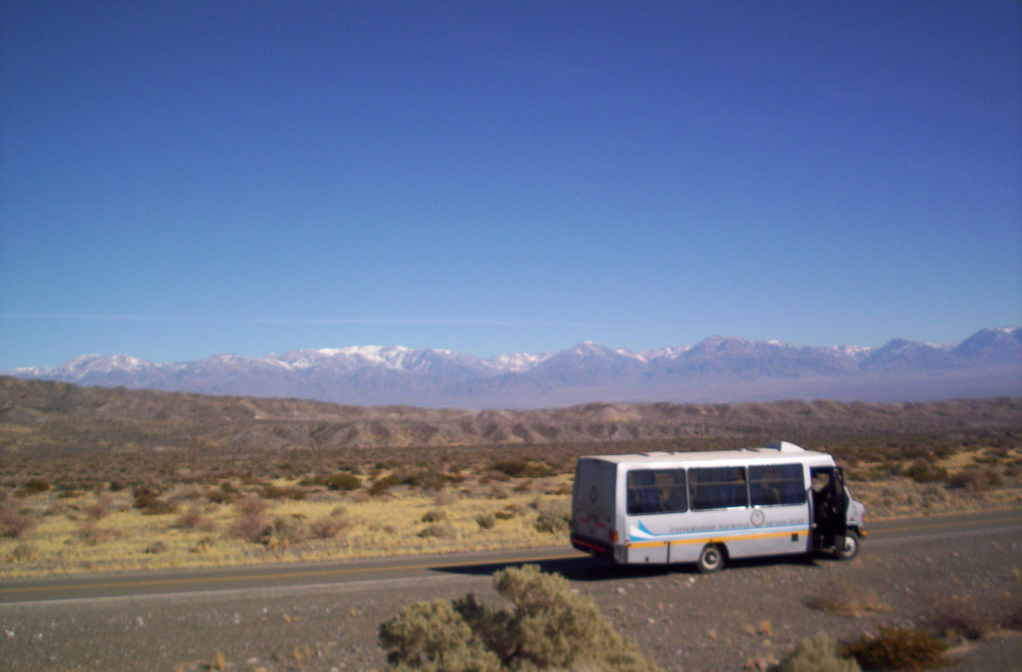 Vista a un típico paisaje cordillerano del Departamento Iglesia, provincia de San Juan, Argentina